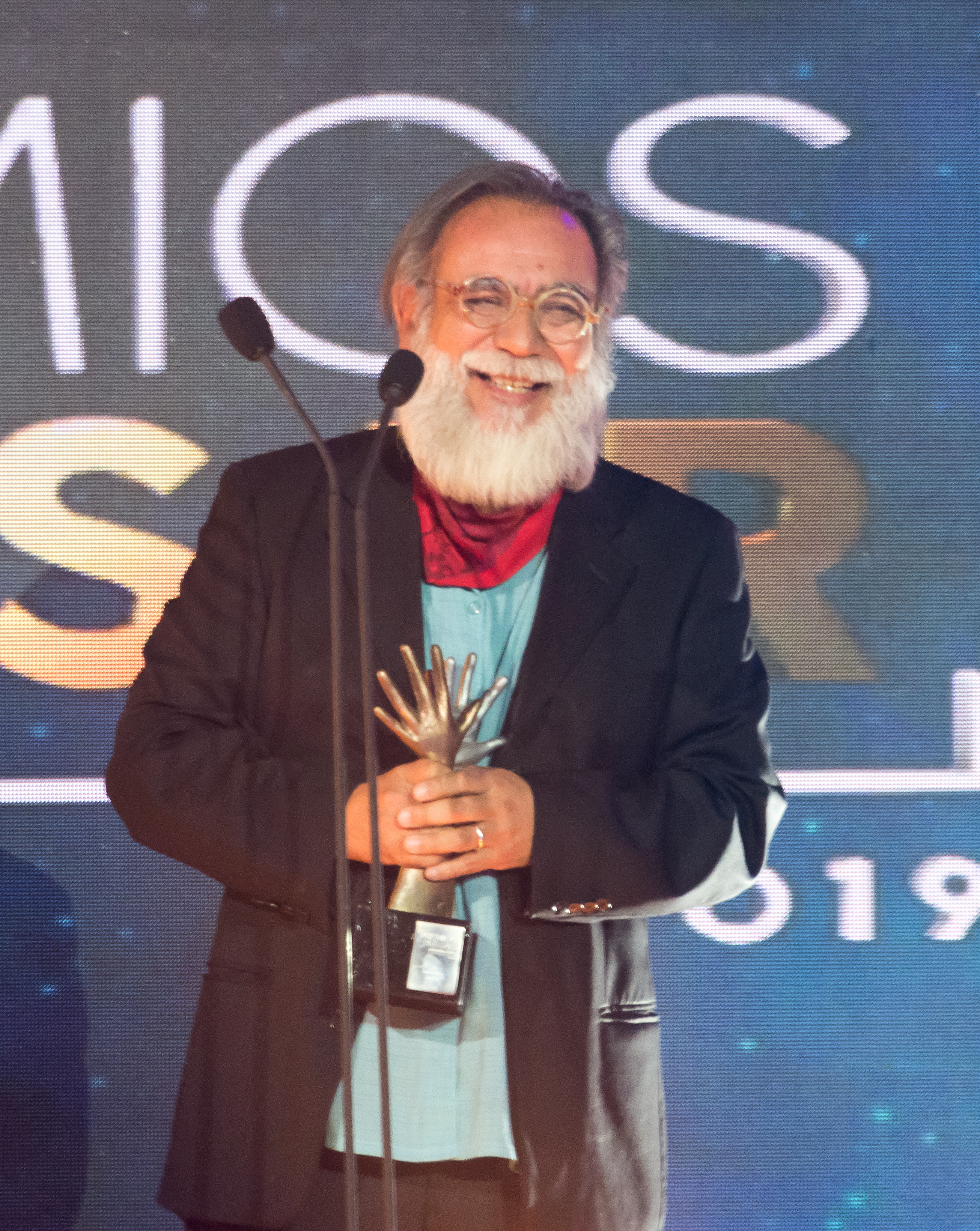 Tilo González, Premios Pulsar 2019, Teatro Teletón, Santiago, Región Metropolitana, Chile.